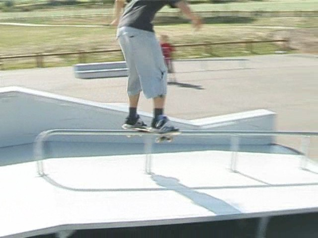 Un backside boardslide sur un petit handrail par maxime, à Dracy en Saône et Loire.